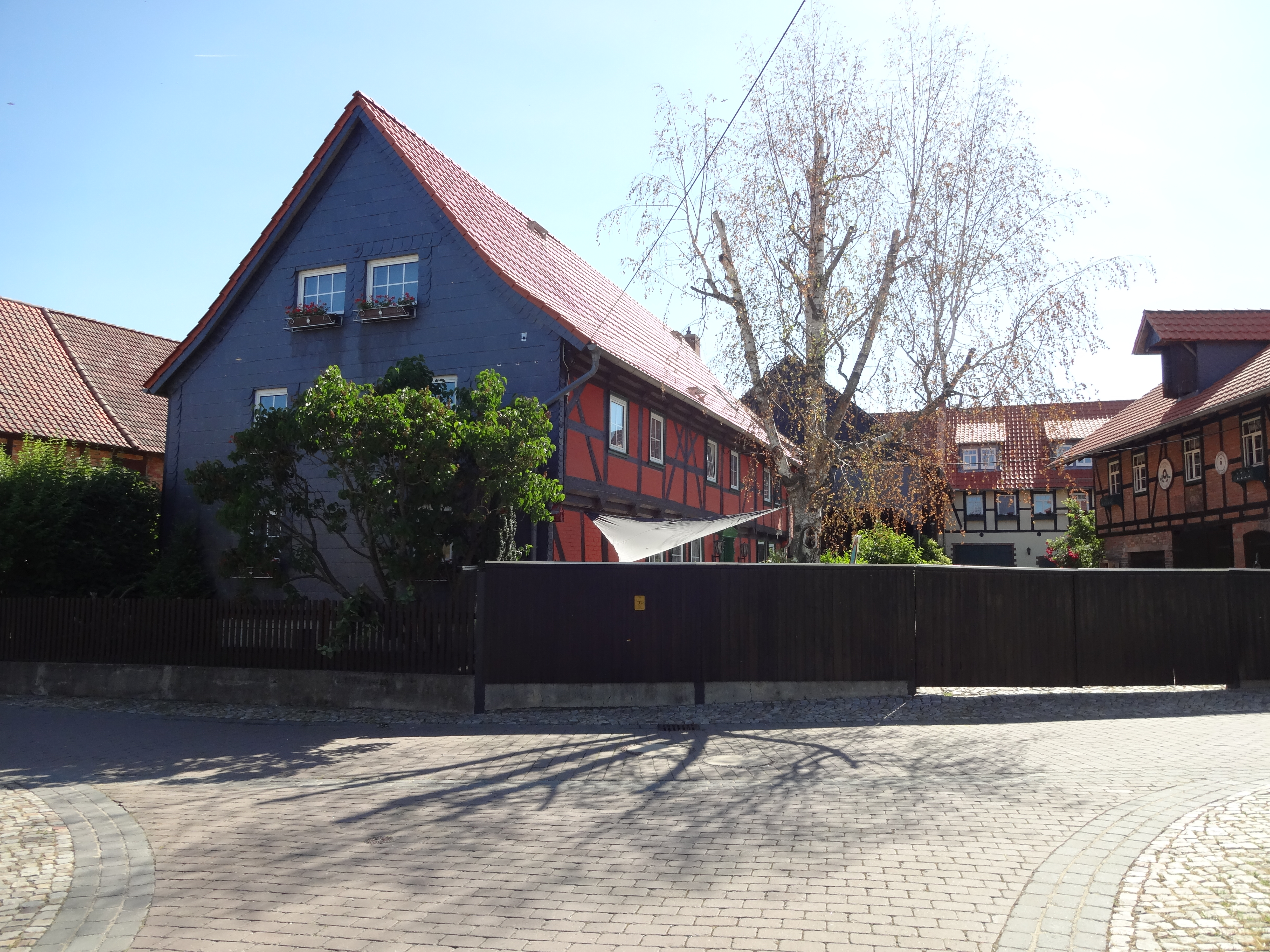 denkmalgeschützter Bauernhof Bäckerstraße 11, 11a in Langeln Gemeinde Nordharz